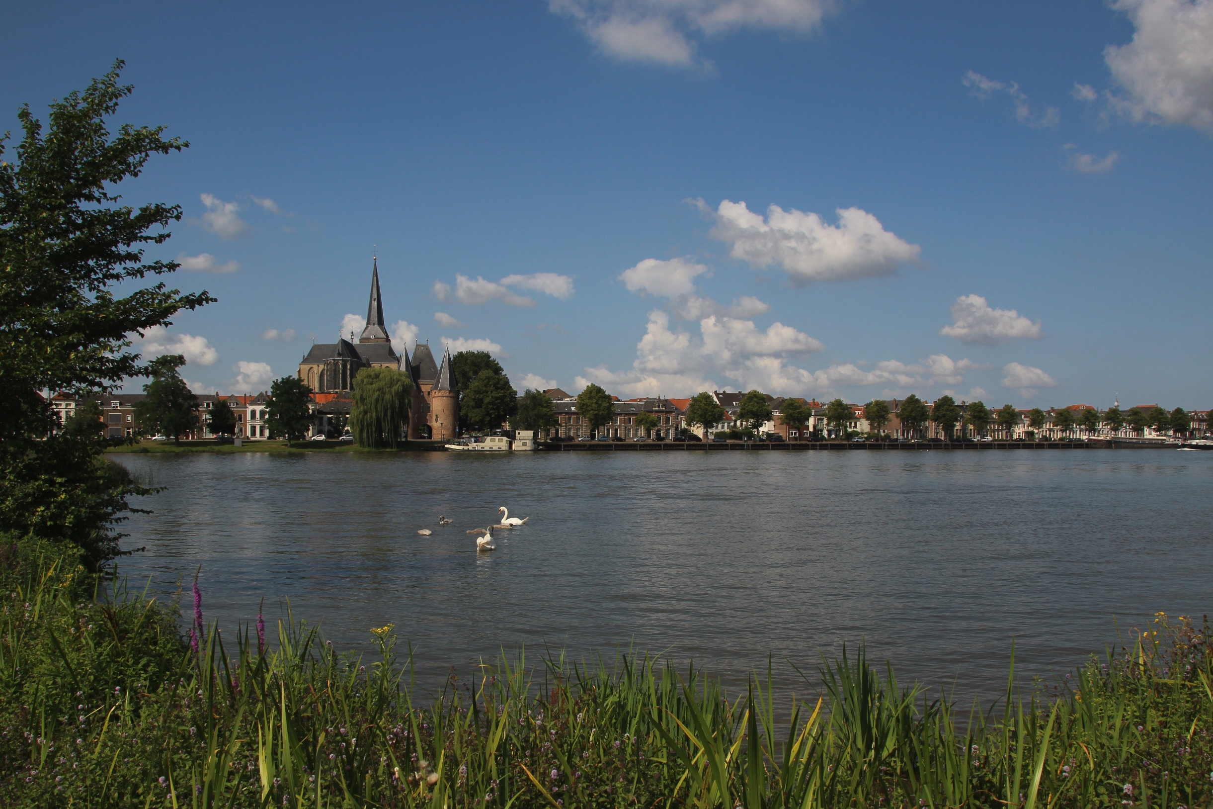 Zicht op de Sint Nicolaas of Bovenkerk en de Koornmarktspoort te Kampen, met IJssel.